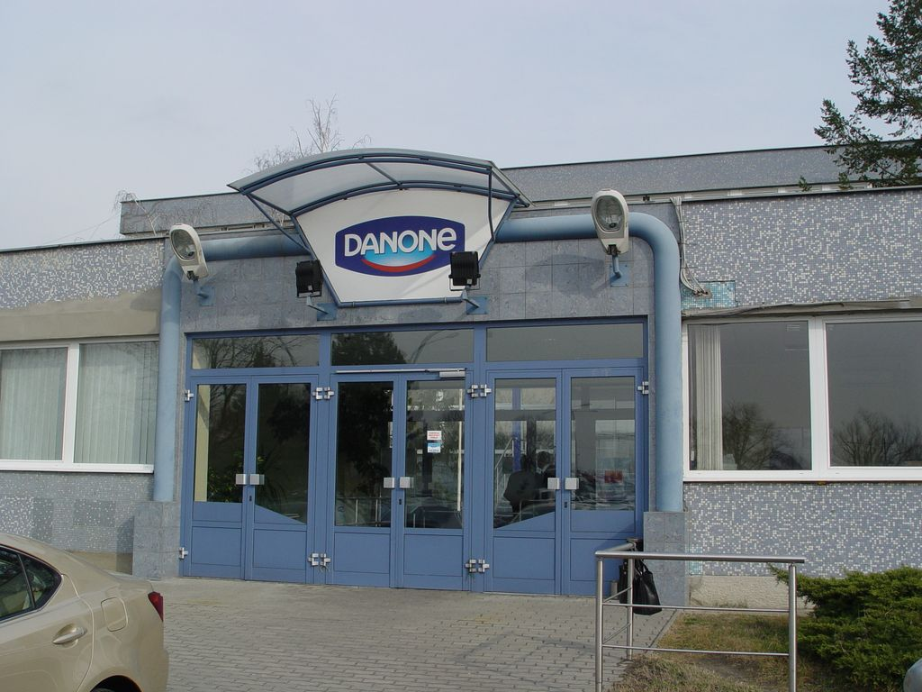 A Danone budapesti telephelye, XIII. kerület. Bezárt?!